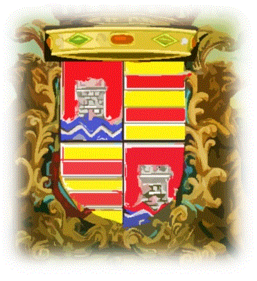 Escudo familiar del Linaje aragonés de Latas